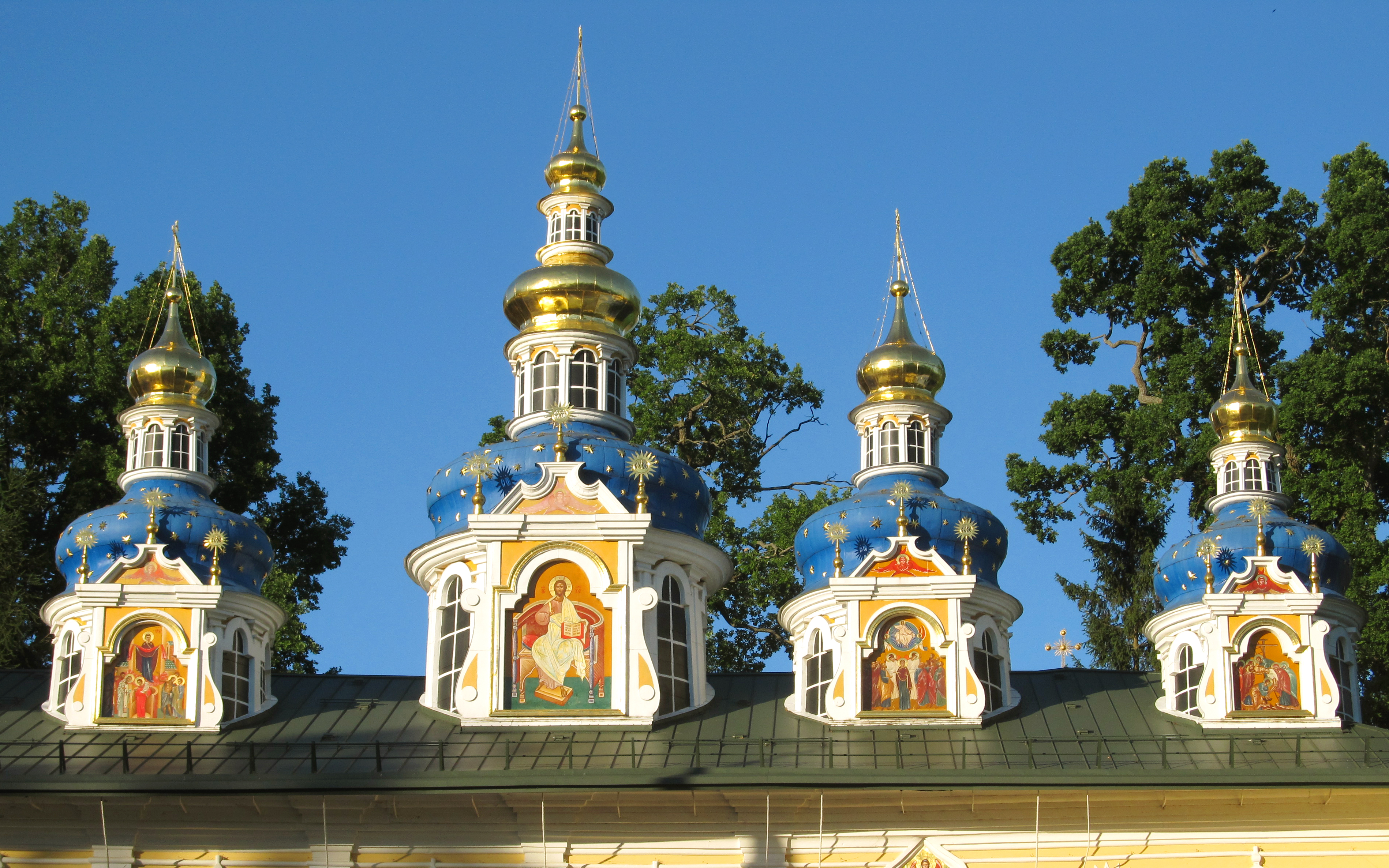 собор Успенский и церковь Покрова Пресвятой Богородицы (Успенская и Покровская церкви): Печоры, Печорский район, Псковская область